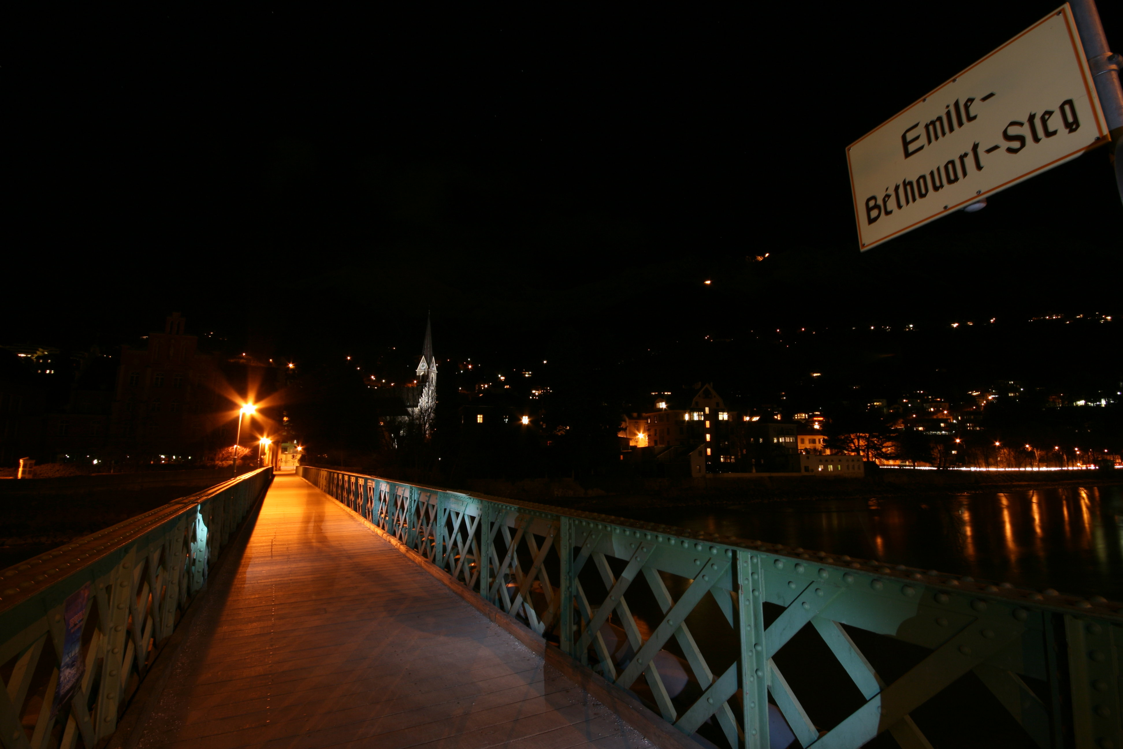 Émile Béthouart Steg in Innsbruck